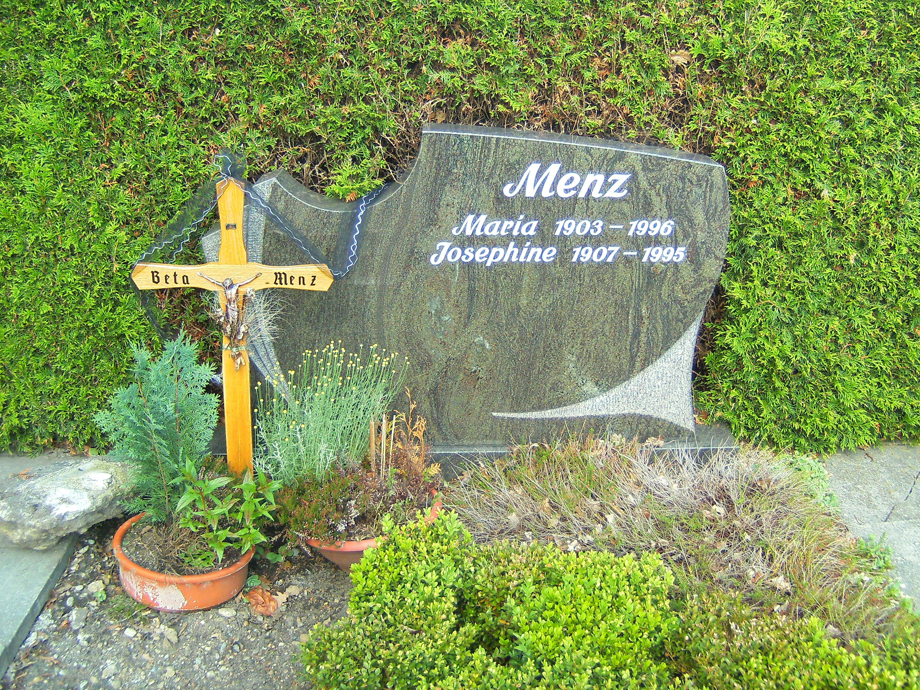 Grabstätte Maria Menz und weiterer drei Schwestern auf dem Friedhof in Oberessendorf